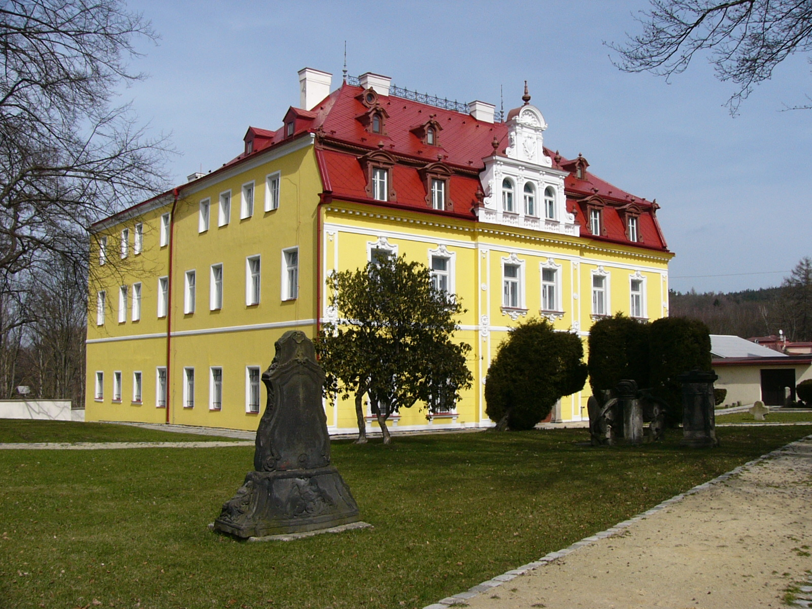 Museum von Asch